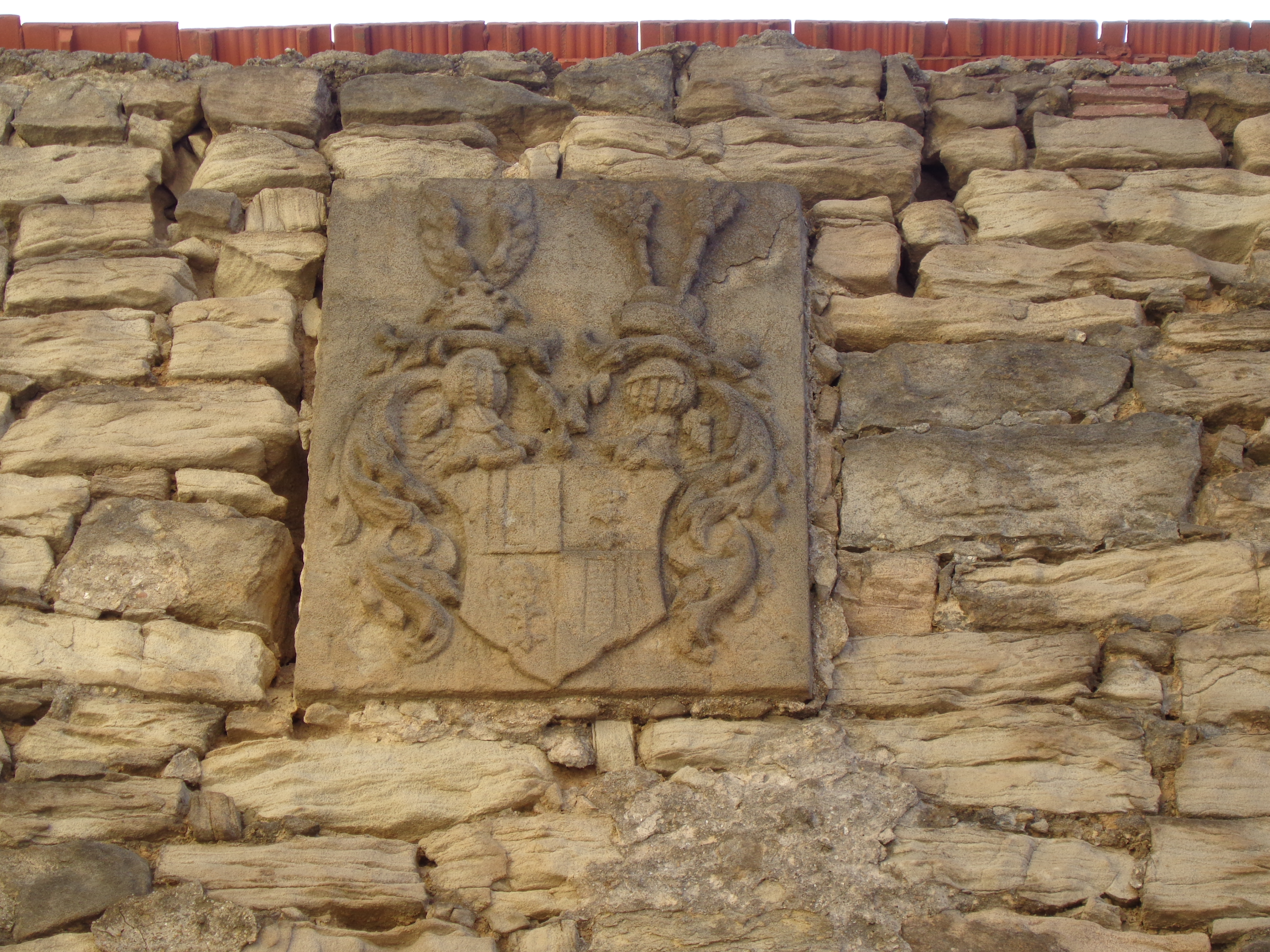 Wappen der von Bünau am Tempeltor in Droyßig, Burgenlandkreis, Sachsen-Anhalt